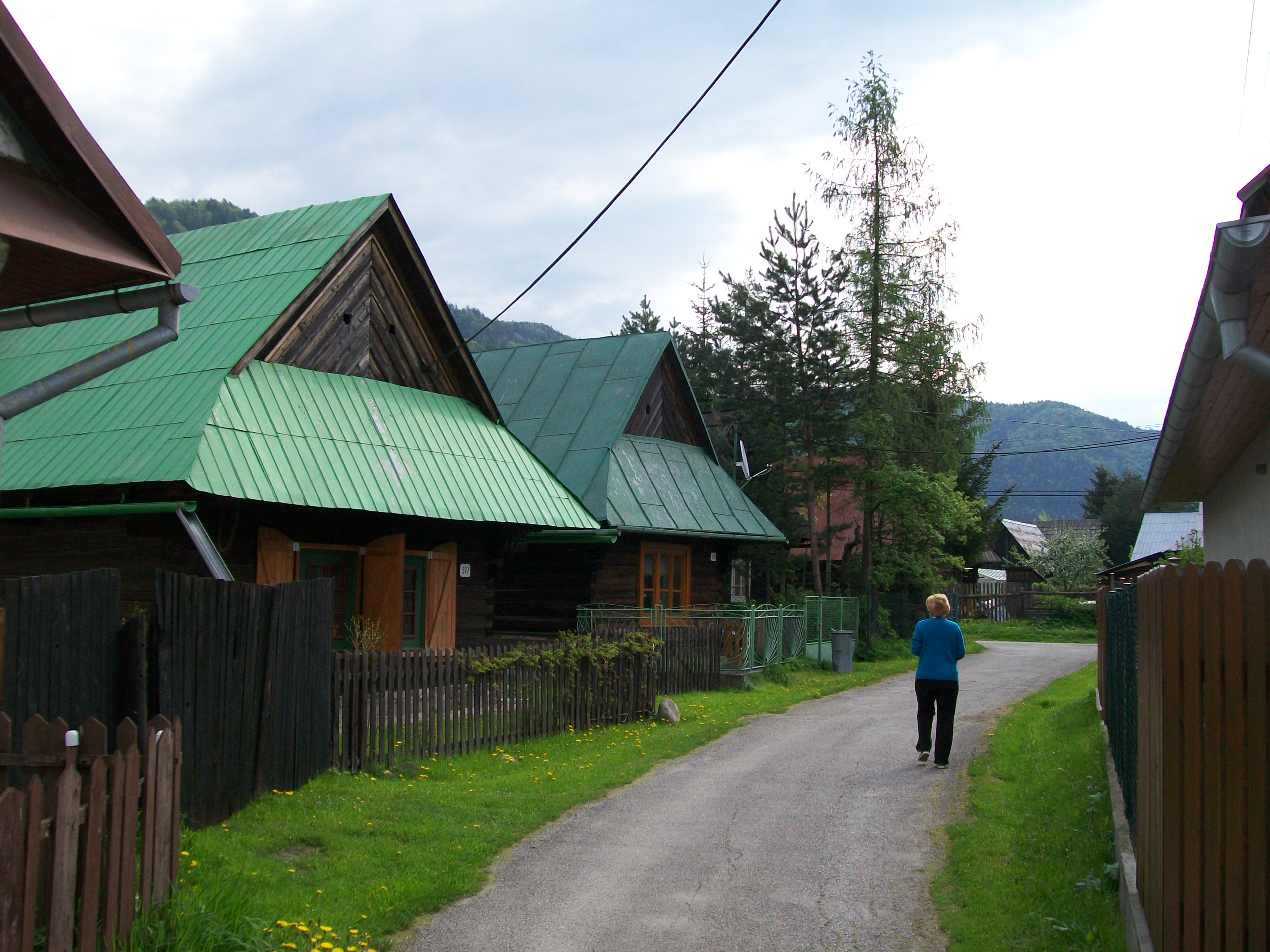 Malebné drevenice v obci Liptovská Osada